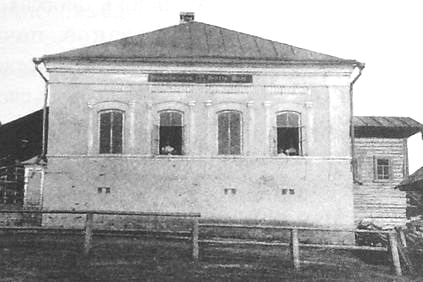 Церковно-парафіяльна школа в селі Старі Зятці, Удмуртія